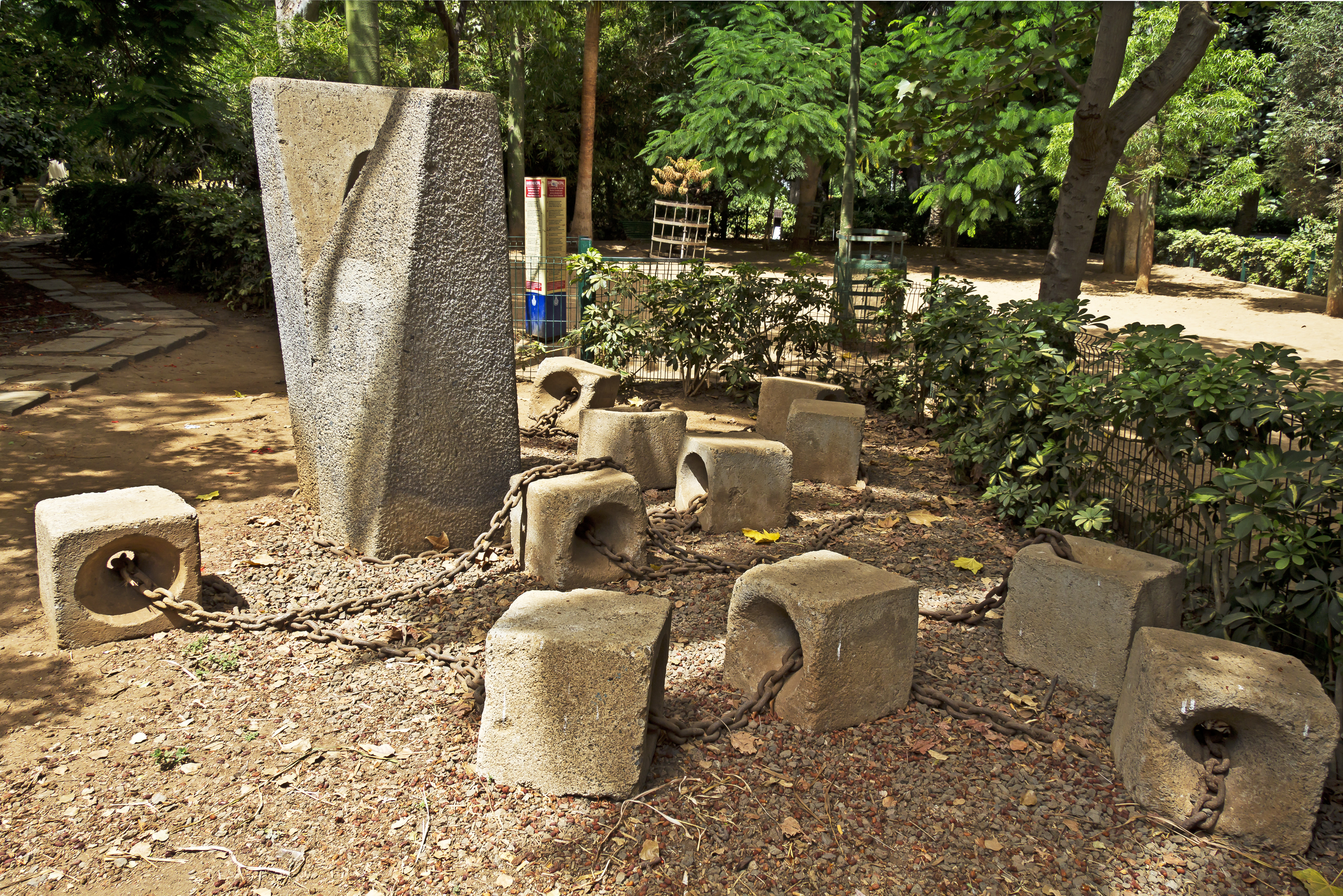 Das Ensemble „Solidaridad“ wurde von dem 1913 in Diest (Belgien) geborenen Künstler Mark Macken geschaffen. Es wurde 1973 Rahmen der „Exposición Internacional de Escultura en la Calle“ der Architektenkammer der Kanarischen Inseln im Parque García Sanabria in Santa Cruz de Tenerife installiert.